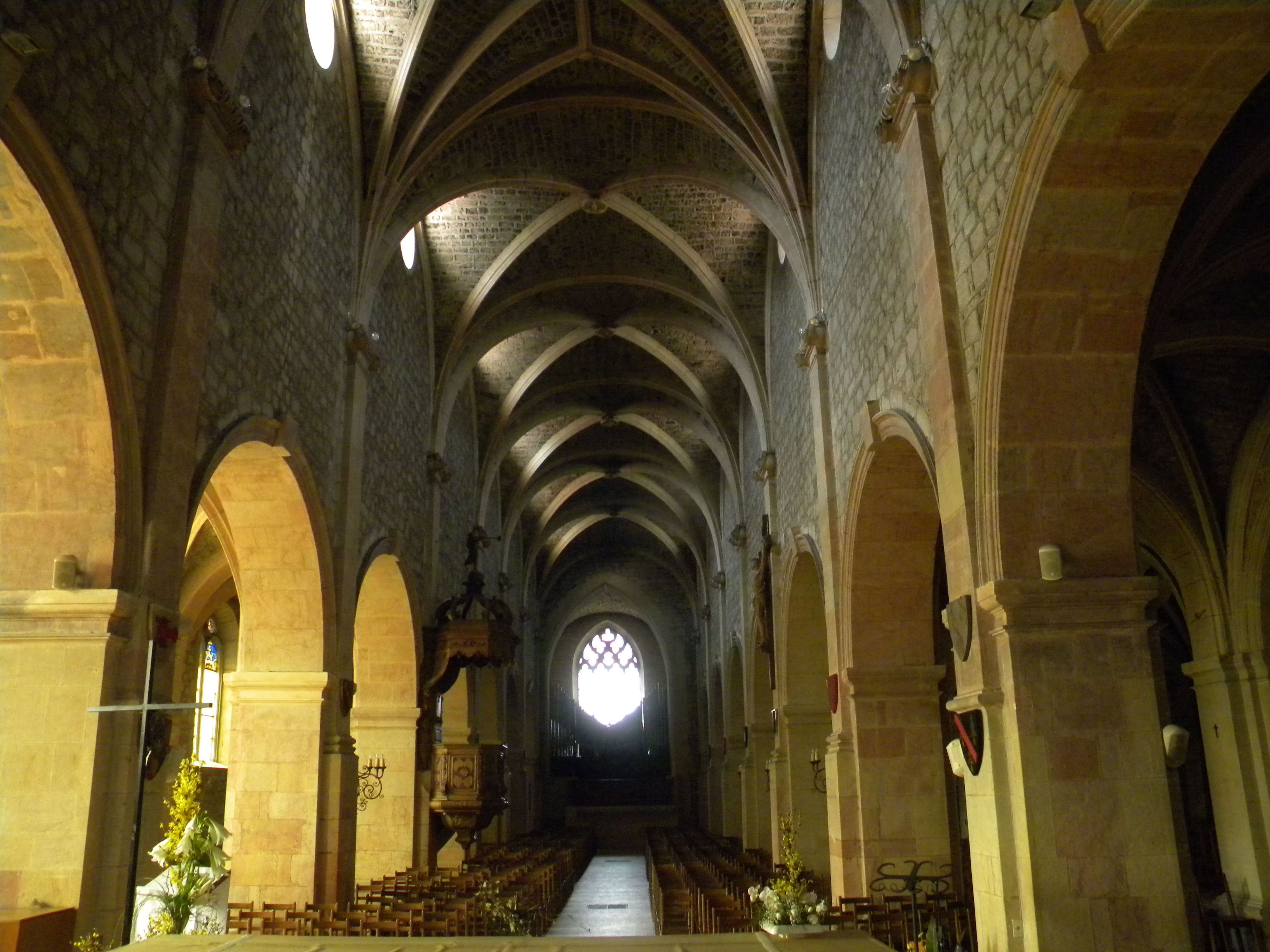 nef de Notre-Dame